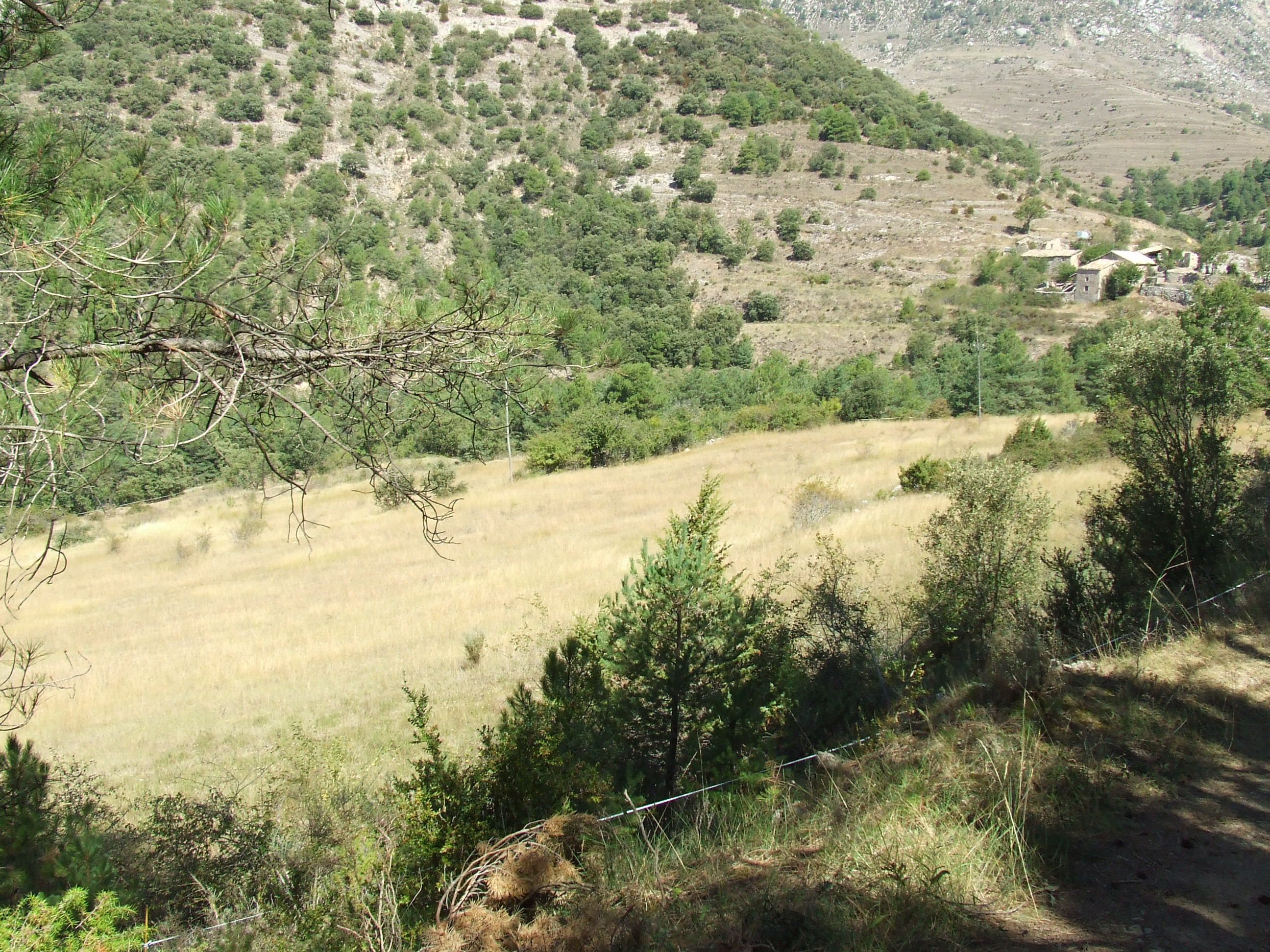 L'Argelagosa (la Torre d'Eroles, Abella de la Conca, Pallars Jussà)